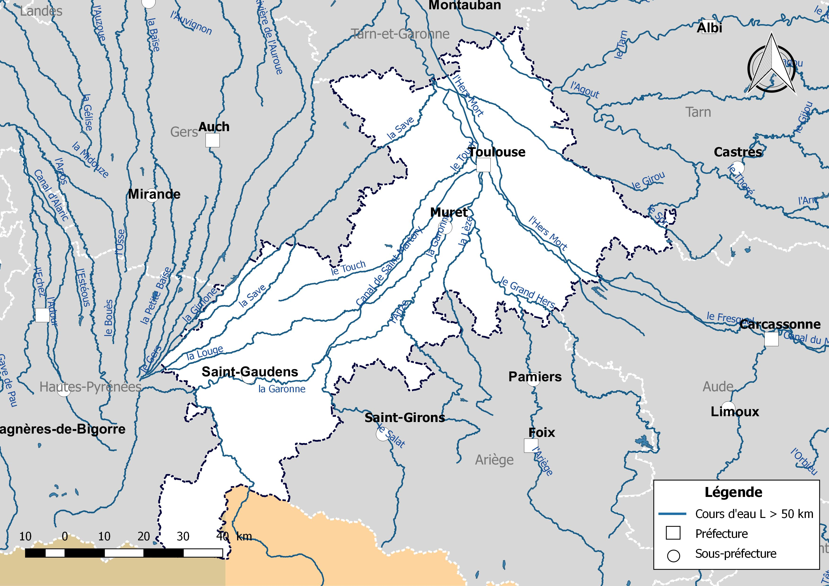 Carte des cours d'eau de longueur supérieure à 50 km drainant le département de la Haute-Garonne (France).